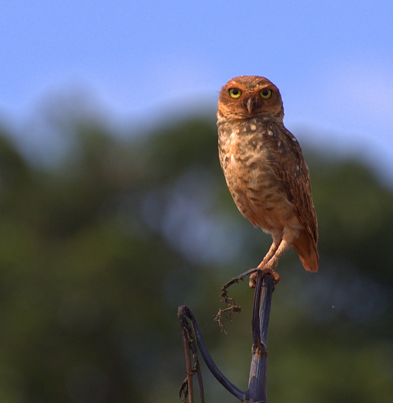 Athene cunicularia "Território dos Calçados" em Jaú, São Paulo, Brasil.